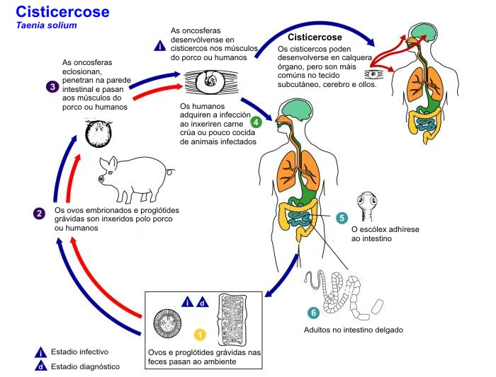 Cisticercose por Tenia solium translated to Galician